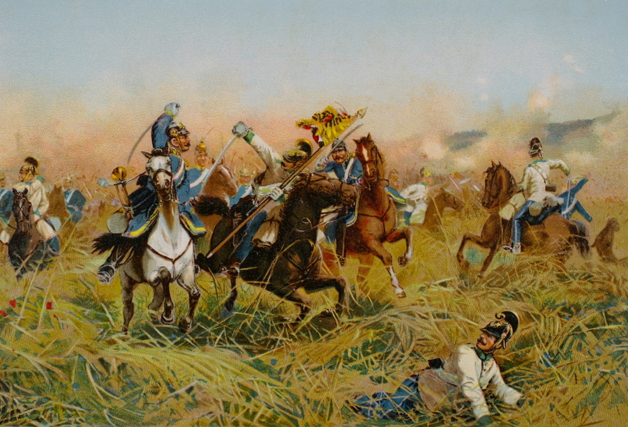 Combat entre les cavaleries prussiennes et autrichiennes lors de la bataille de Nachod, le 27 juin 1866. Tableau de Richard Knötel.